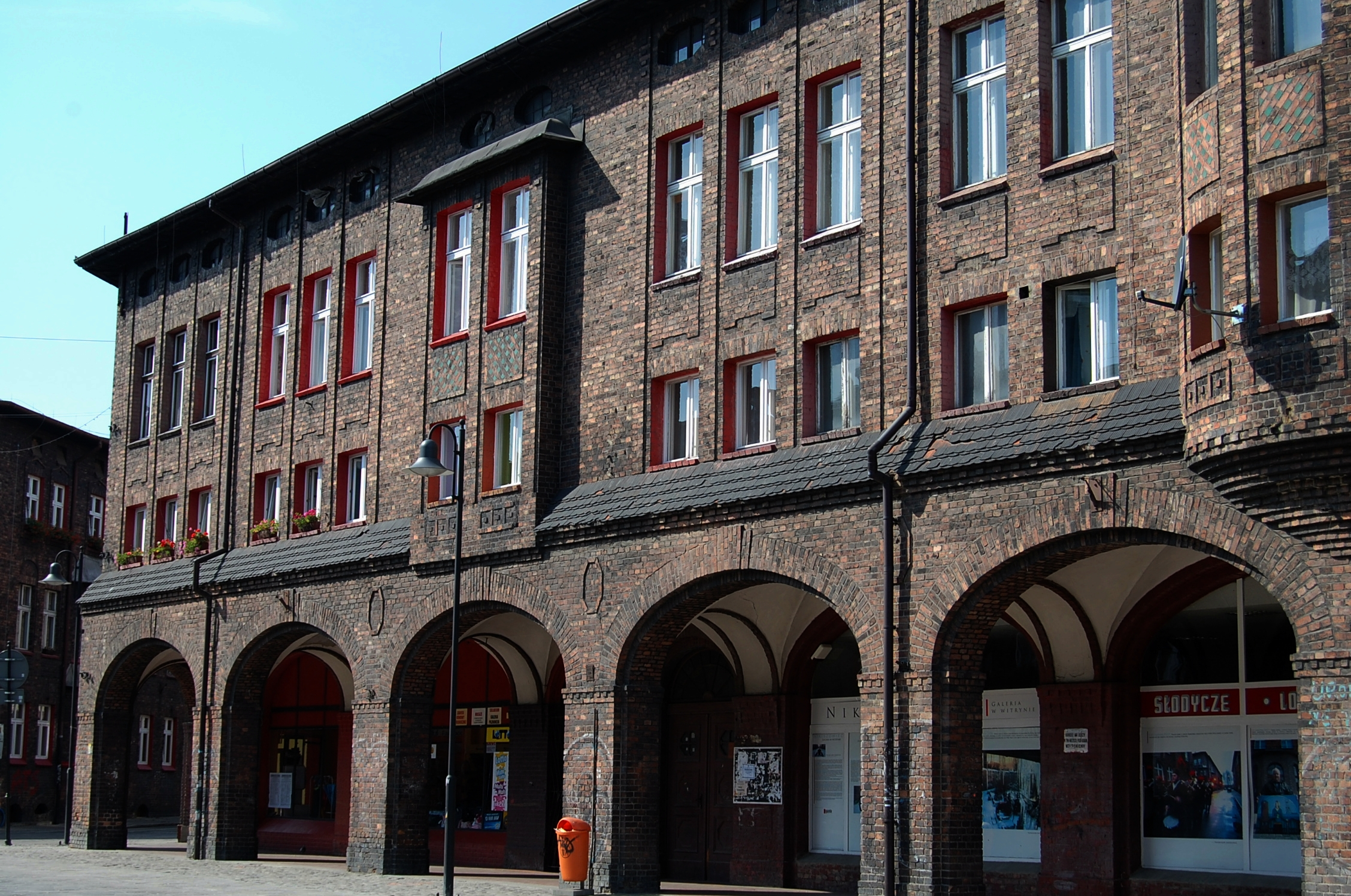 rynek główny w Nikiszowcu